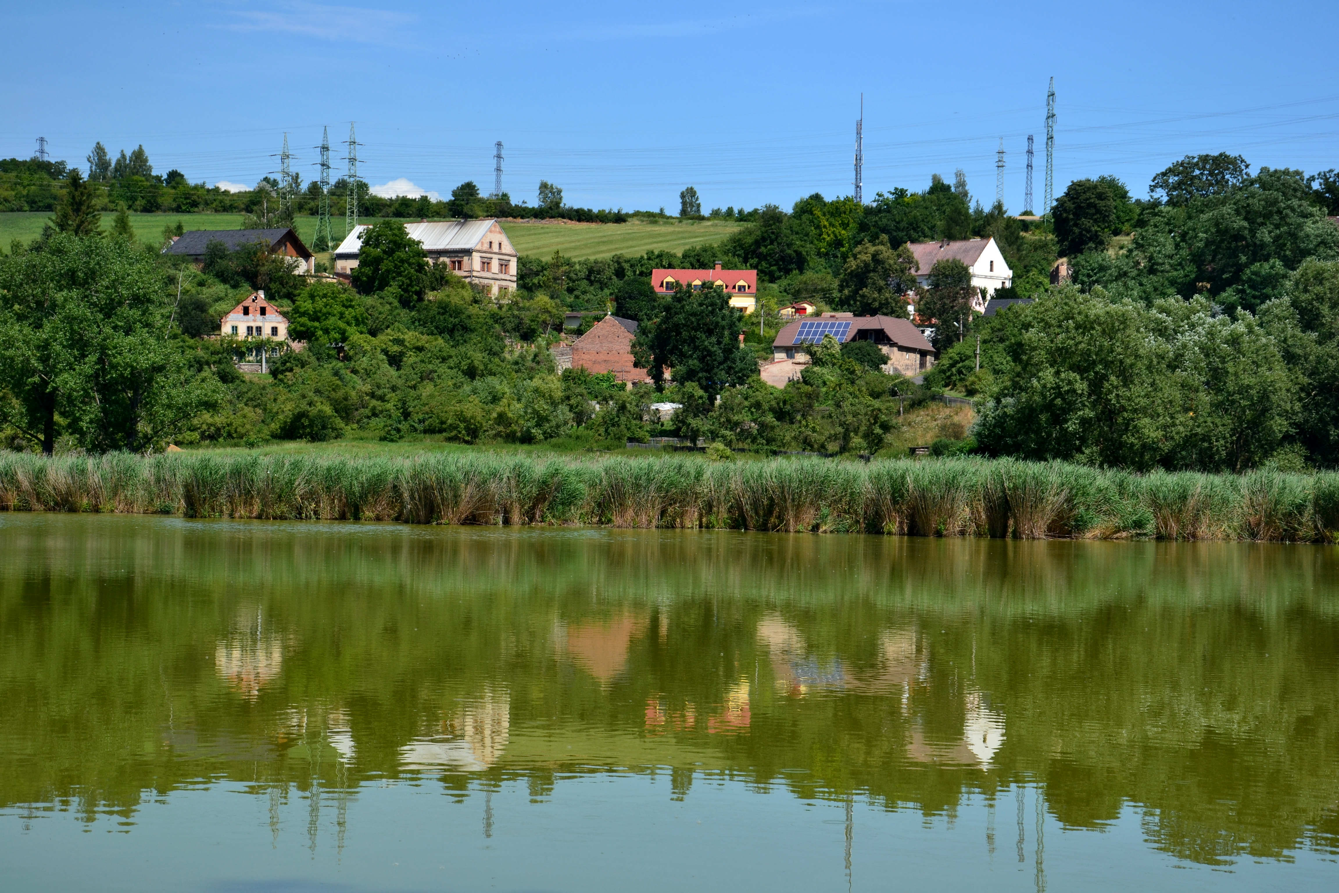 PR Malhostický rybník - Malhostice